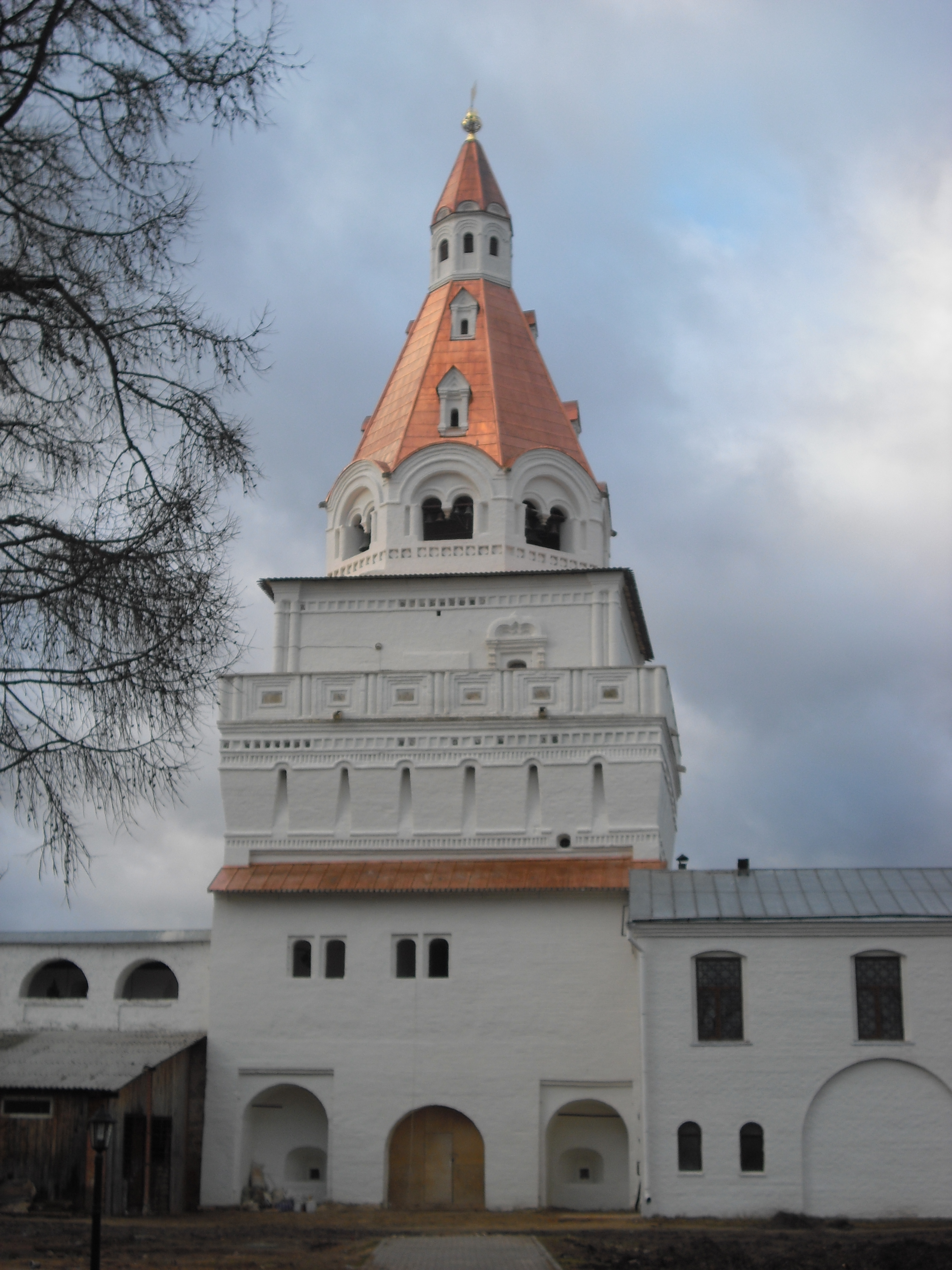 Одна из башен Иосифо-Волоцкого монастыря